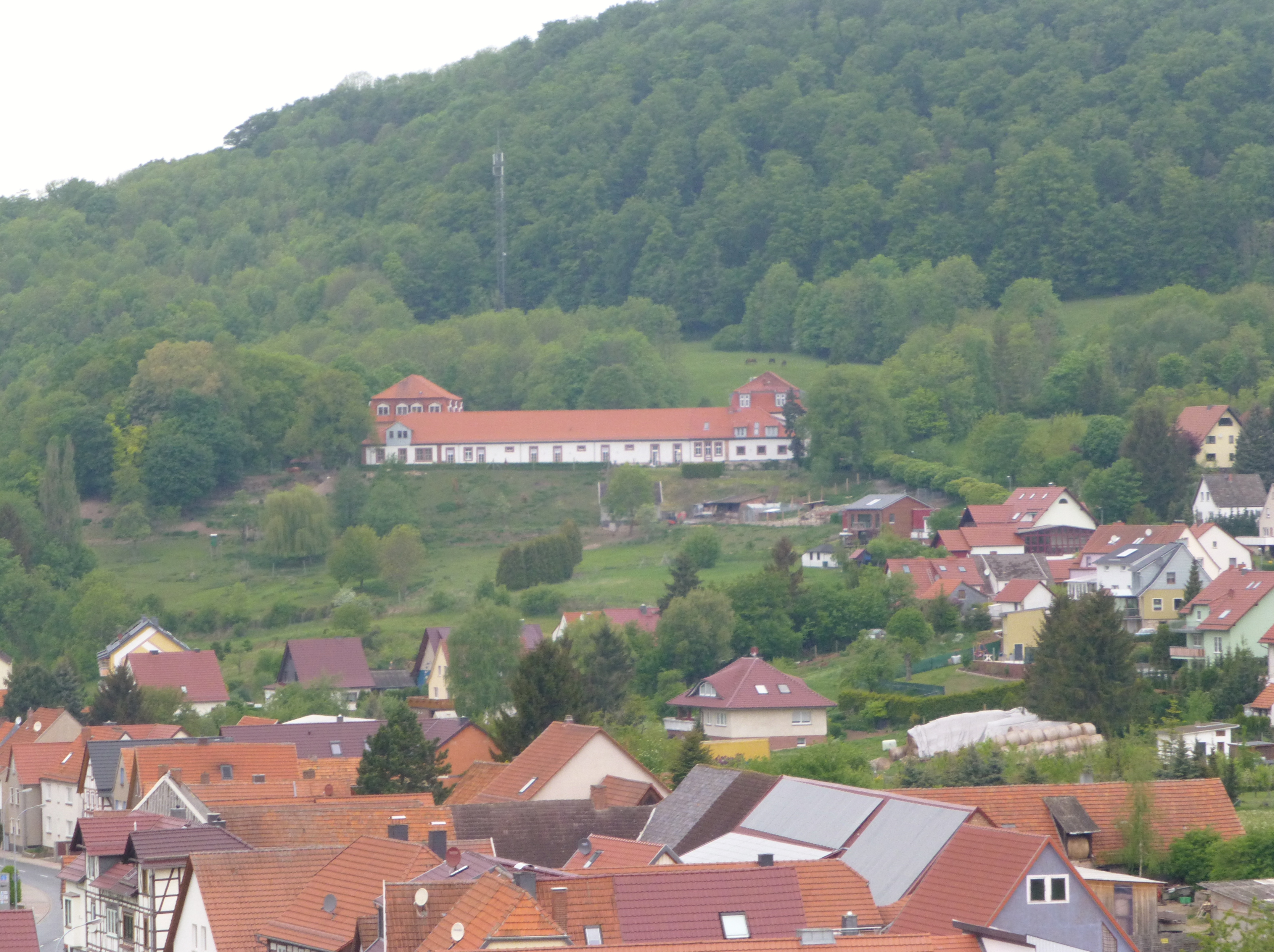 Schloss Bischofstein oberhalb von Lengenfeld